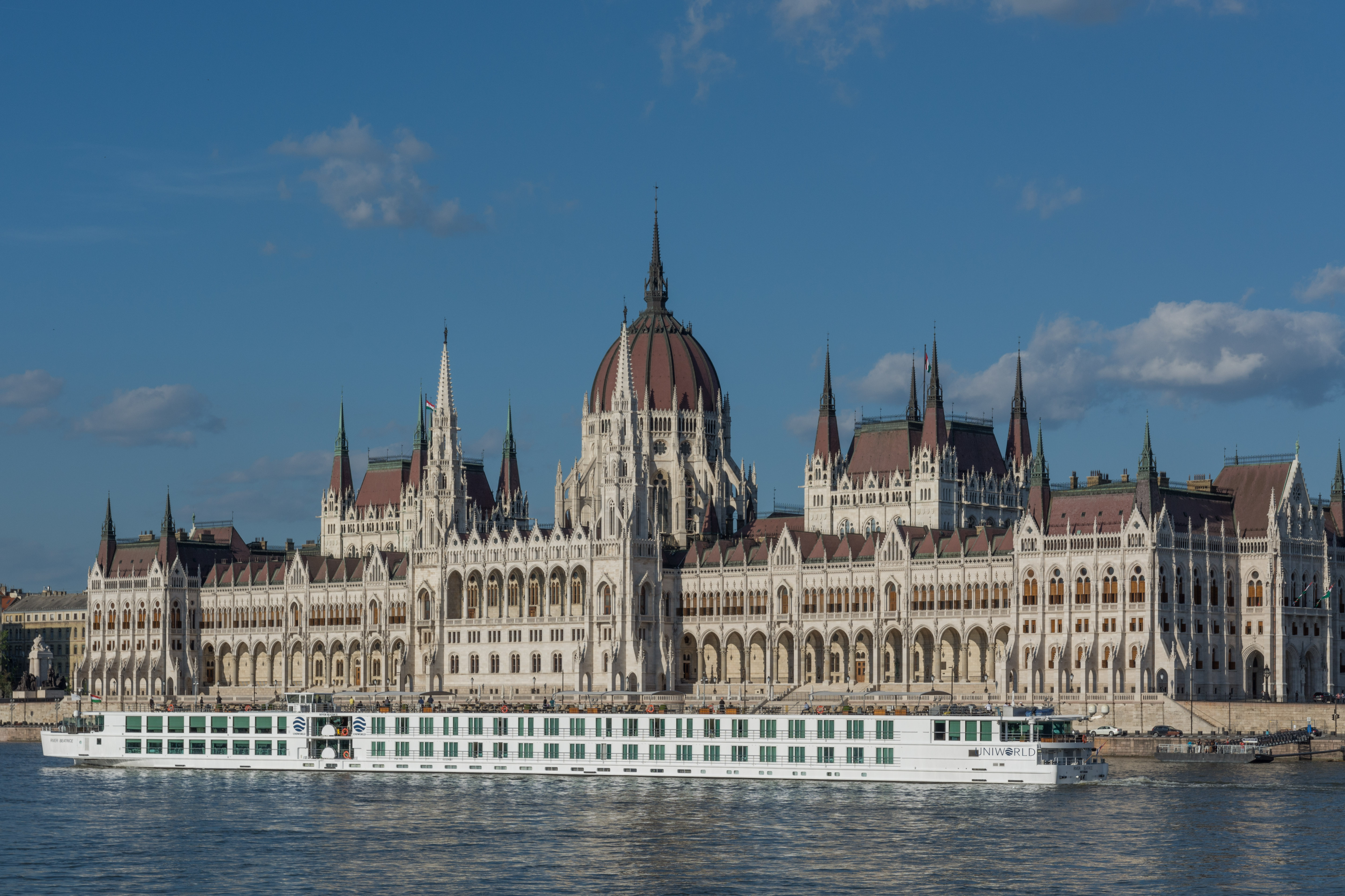 Budapest Országház